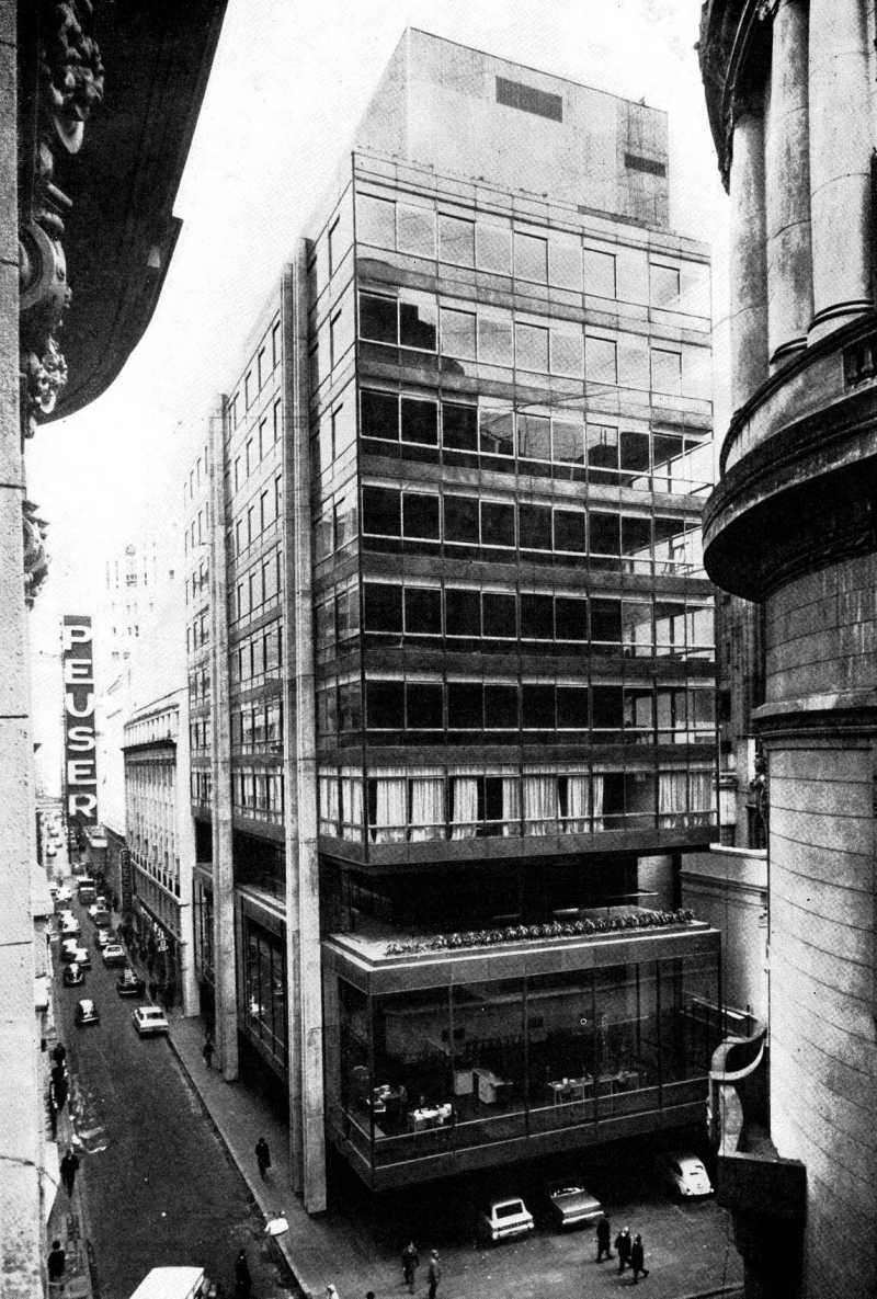 Edificio de oficinas del Bank of America, obra de Mario Roberto Álvarez y de Aslan y Ezcurra. Esquina de las calles San Martín y Teniente General Perón. San Nicolás, Buenos Aires, Argentina.